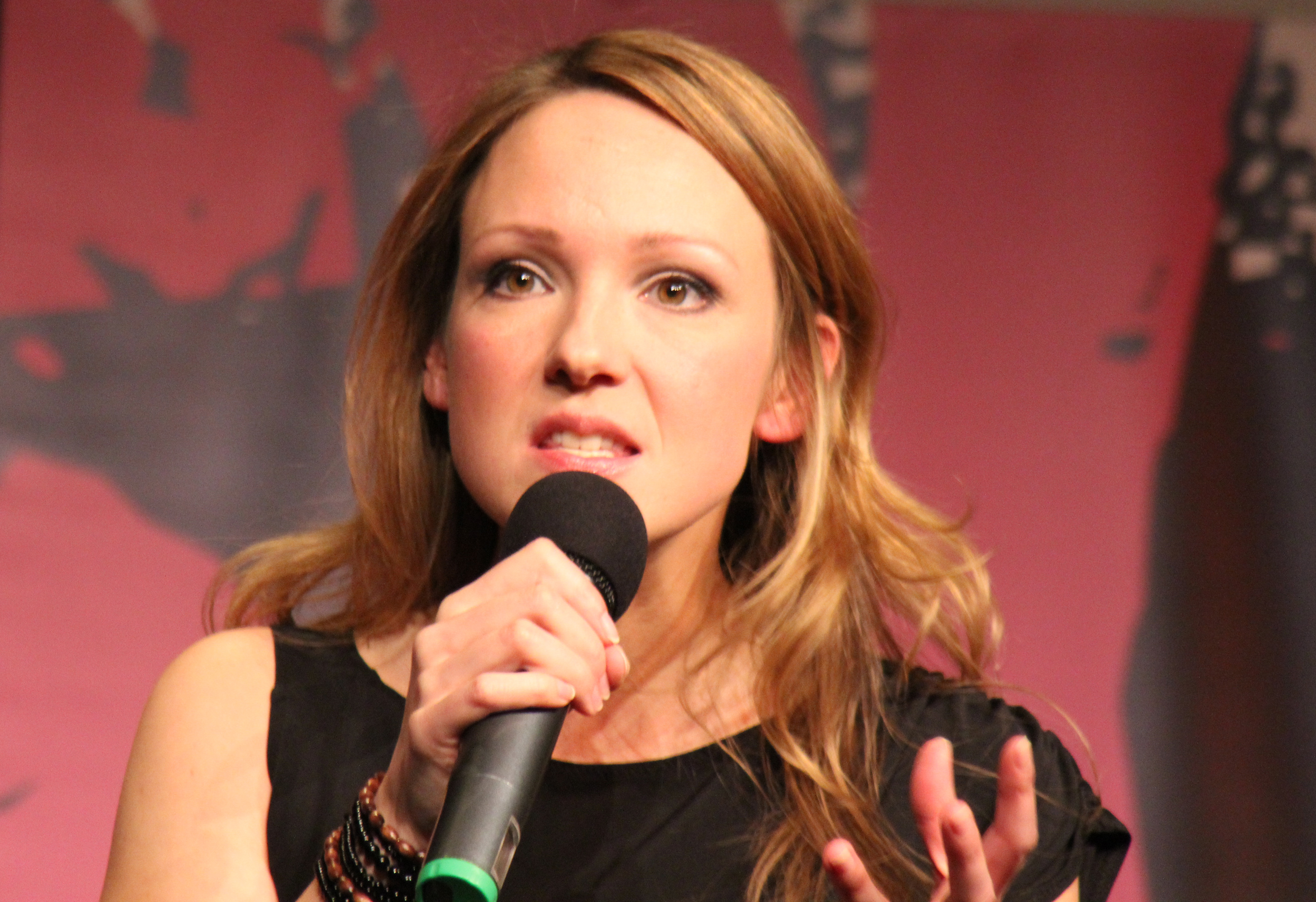 Carolin Kebekus bei einem Auftritt im Bonner Pantheon